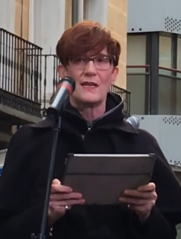 Ruth Toledano